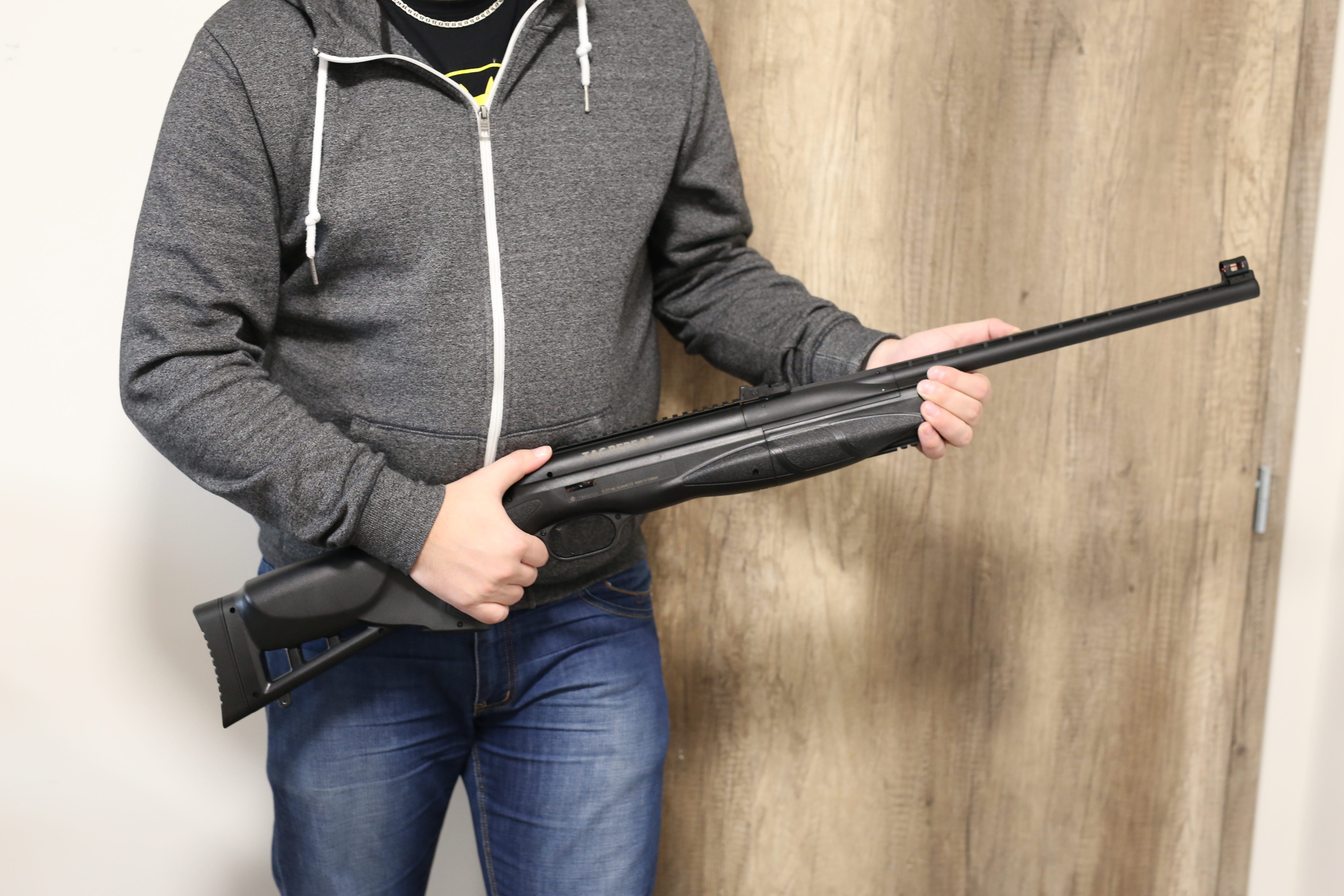 CO2 vzduchovka s polymerovou pažbou, ASG TAC Repeat 4,5mm